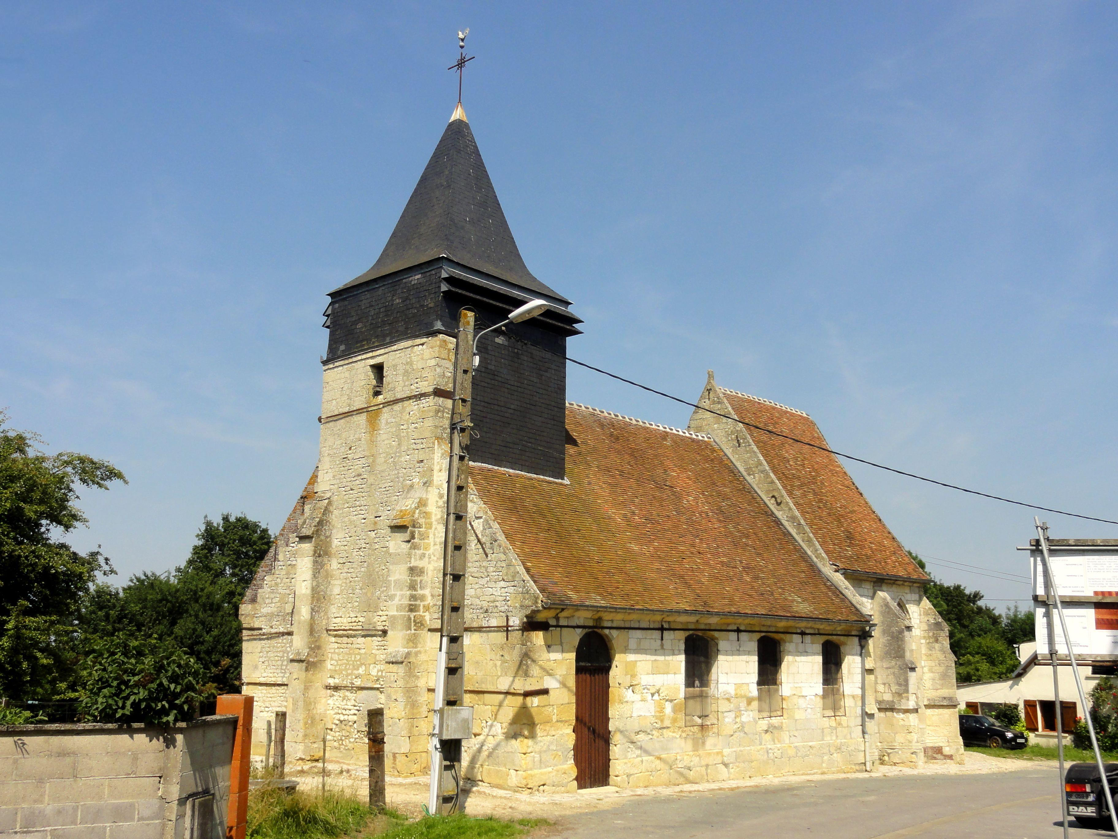 Vue depuis l'ouest.